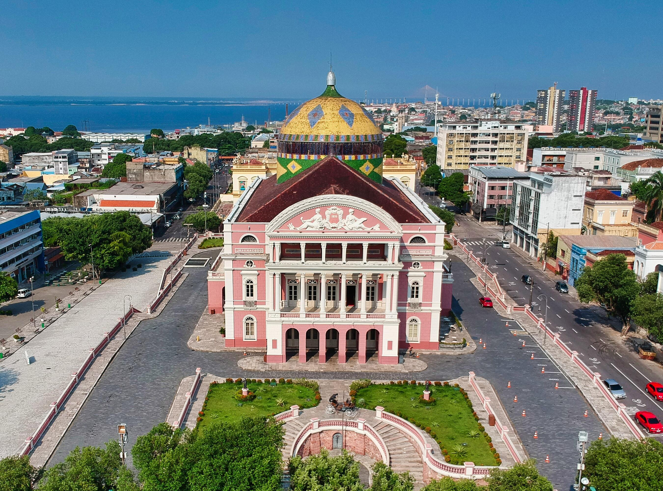 Vista aérea do Teatro Amazonas e Largo de São Sebastião, Manaus, Brasil.